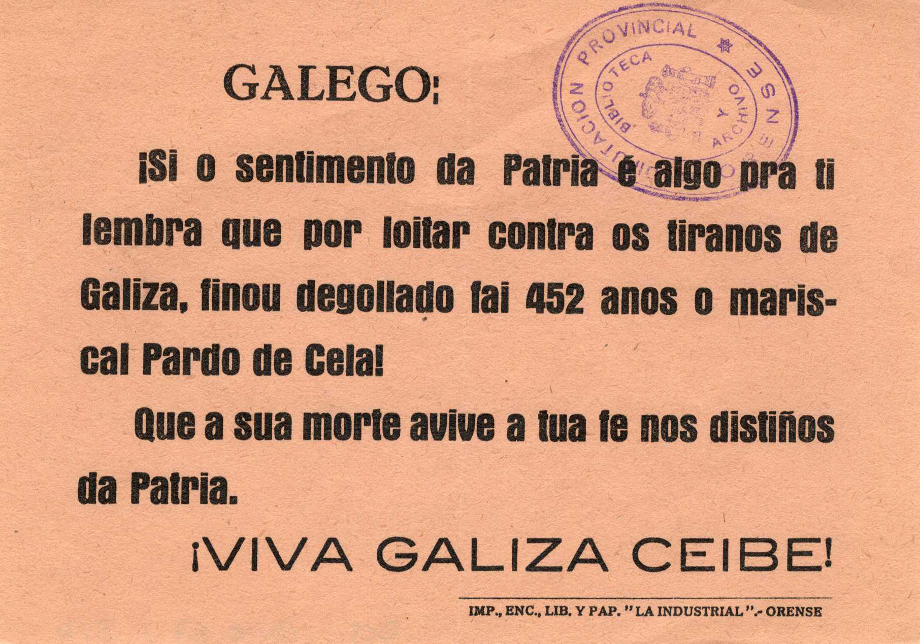 GALEGO: ¡Si o sentimento da Patria é algo pra tilembra que por loitar contra os tiranos deGaliza, finou degollado fai 452 anos o maris-cal Pardo de Cela! Que a sua morte avive a tua fe nos distiñosda Patria. ¡VIVA GALIZA CEIBE! IMP., ENC., LIB. Y PAP. "LA INDUSTRIAL".-ORENSE